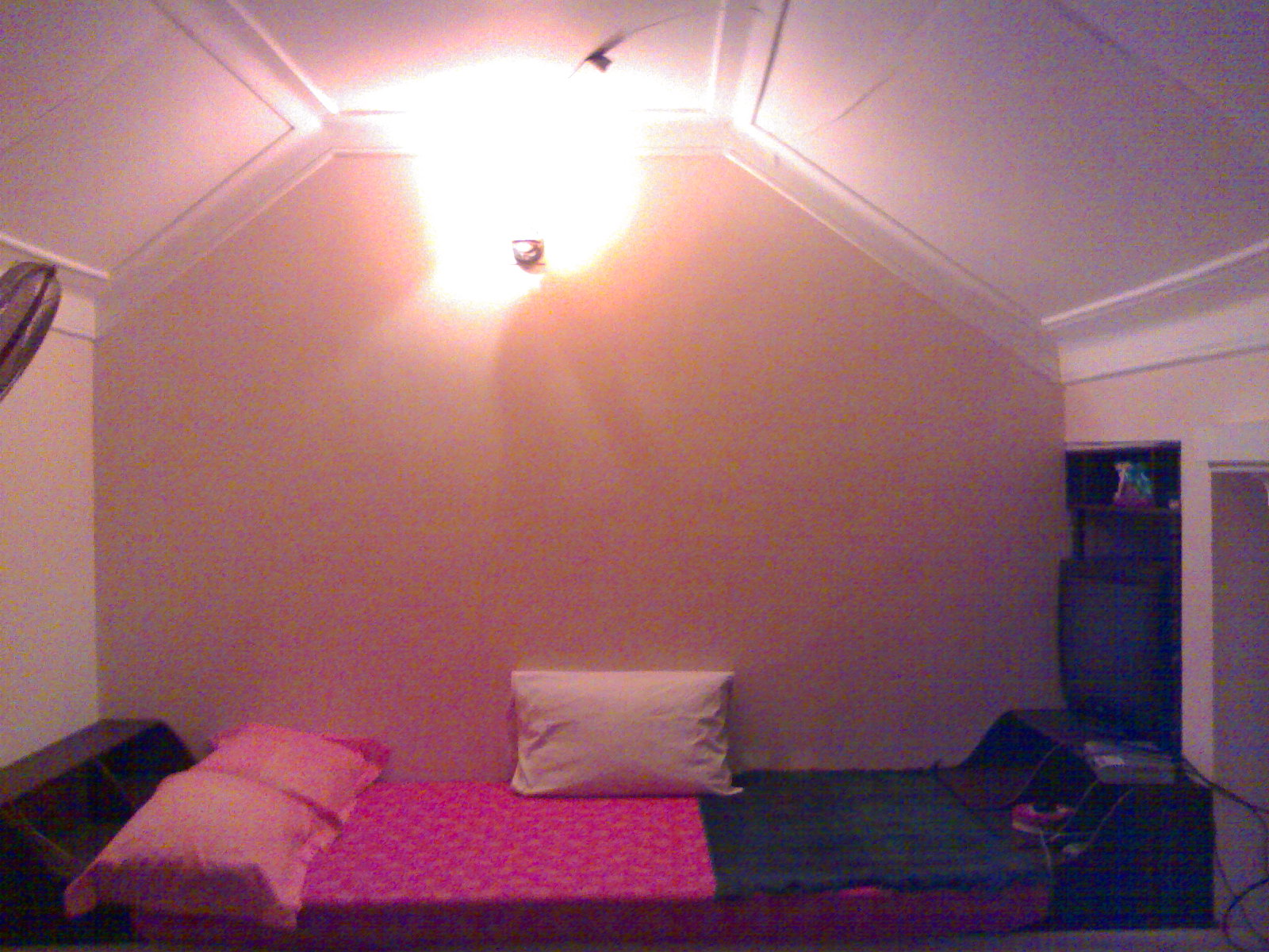 Mattannur, Kerala, India.